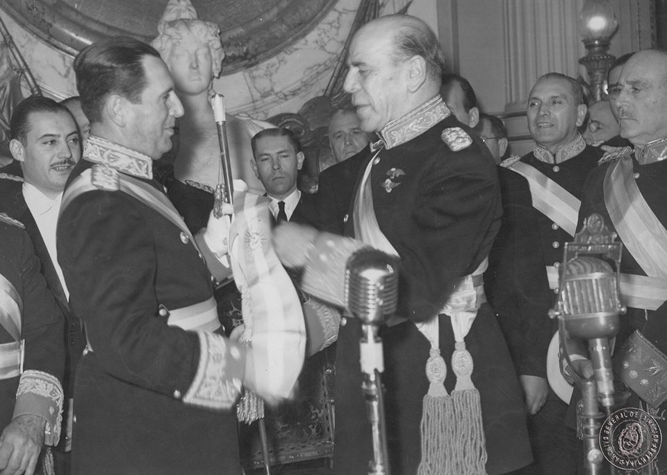 Luego de haber jurado en el Congreso, el presidente Juan Domingo Peron recibe en Casa de Gobierno los atributos de mando -bastón y banda- de parte de Edelmiro Farrell, 4 de junio de 1946.